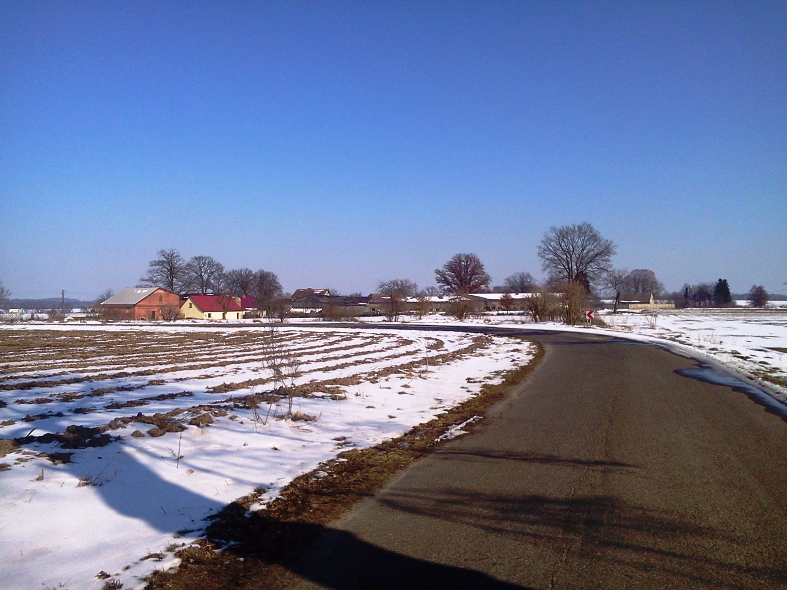 Widok na Pogorzelicę